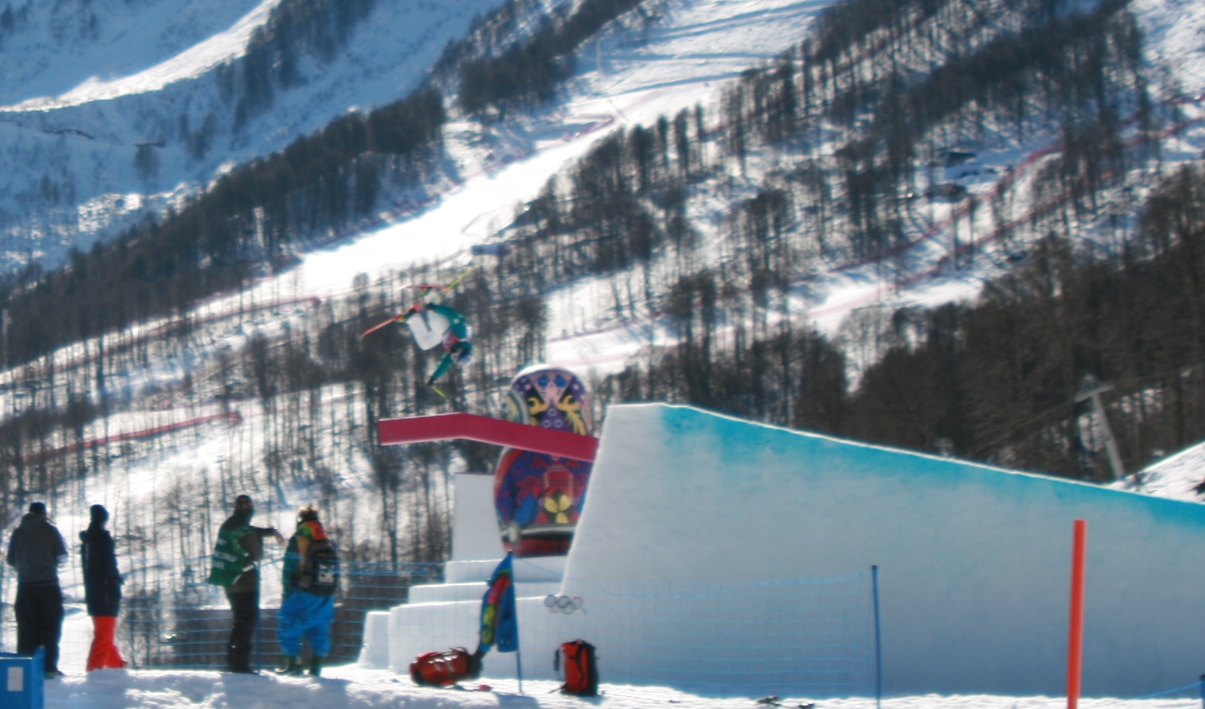 Соревнования по слоупстайлу на зимних Олимпийских играх 2014 в Сочи